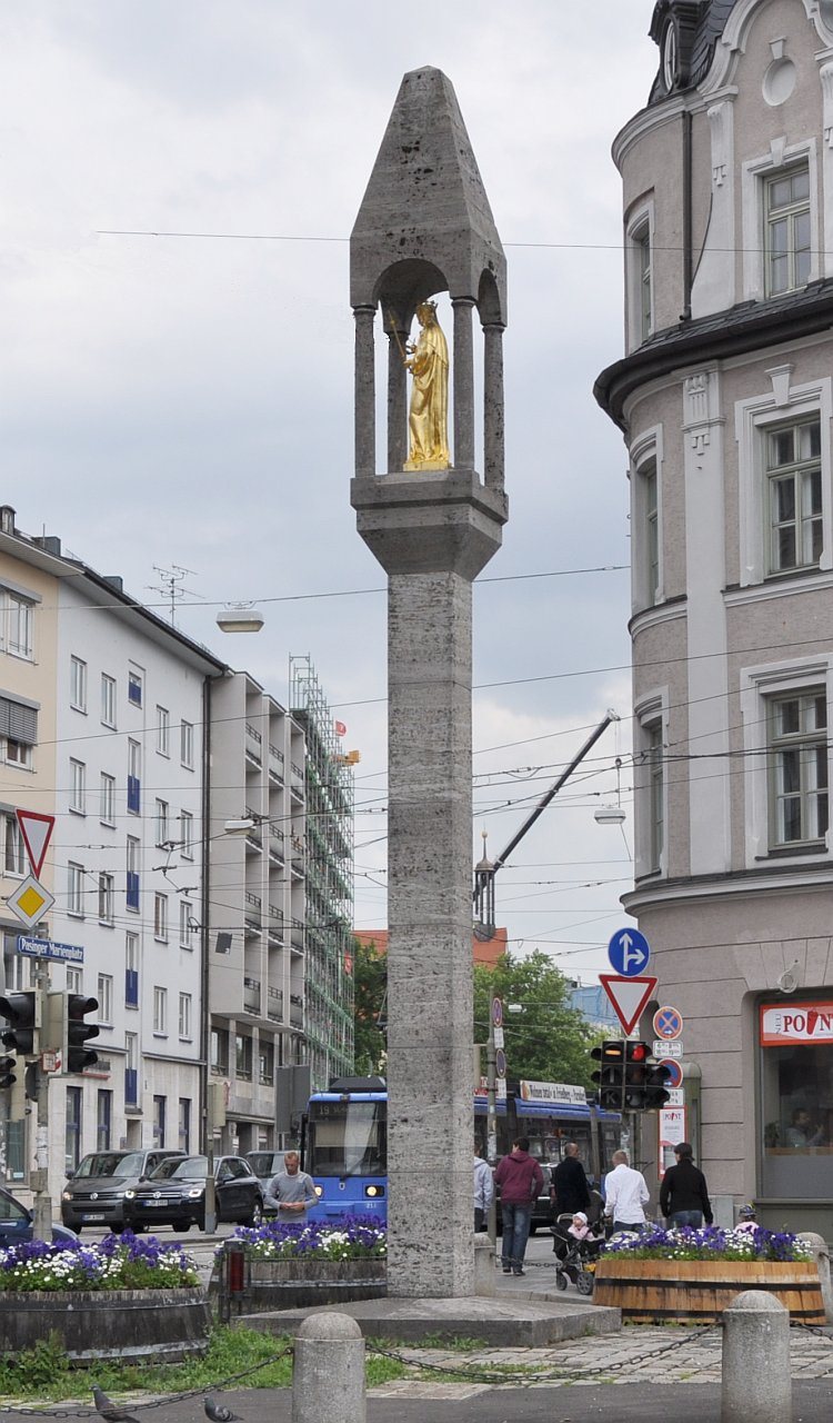 Mariensäule Pasing